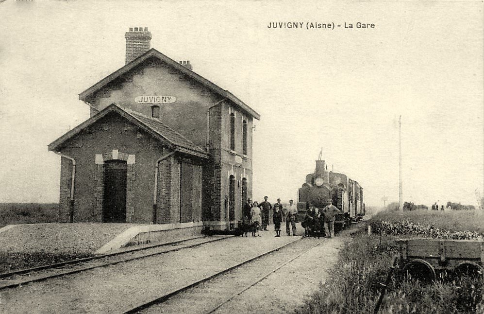 Carte postale de l'ancienne gare